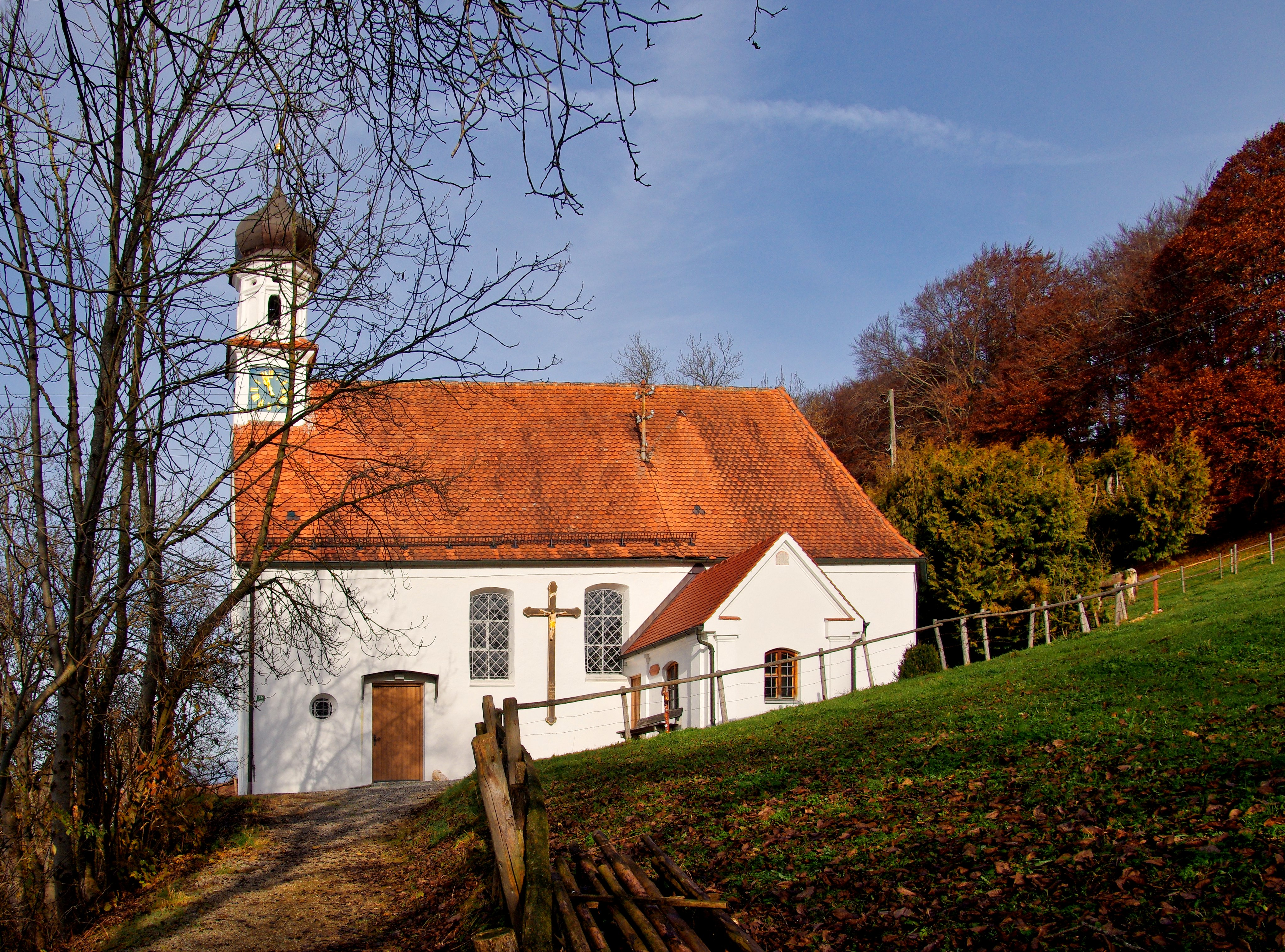 Die Kapelle St. Martin auch zum gegeißelten Heiland